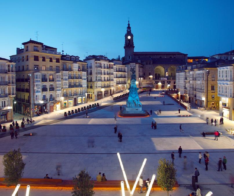 Plaza Virgen Blanca VITORIA-GASTEIZ tras la reforma